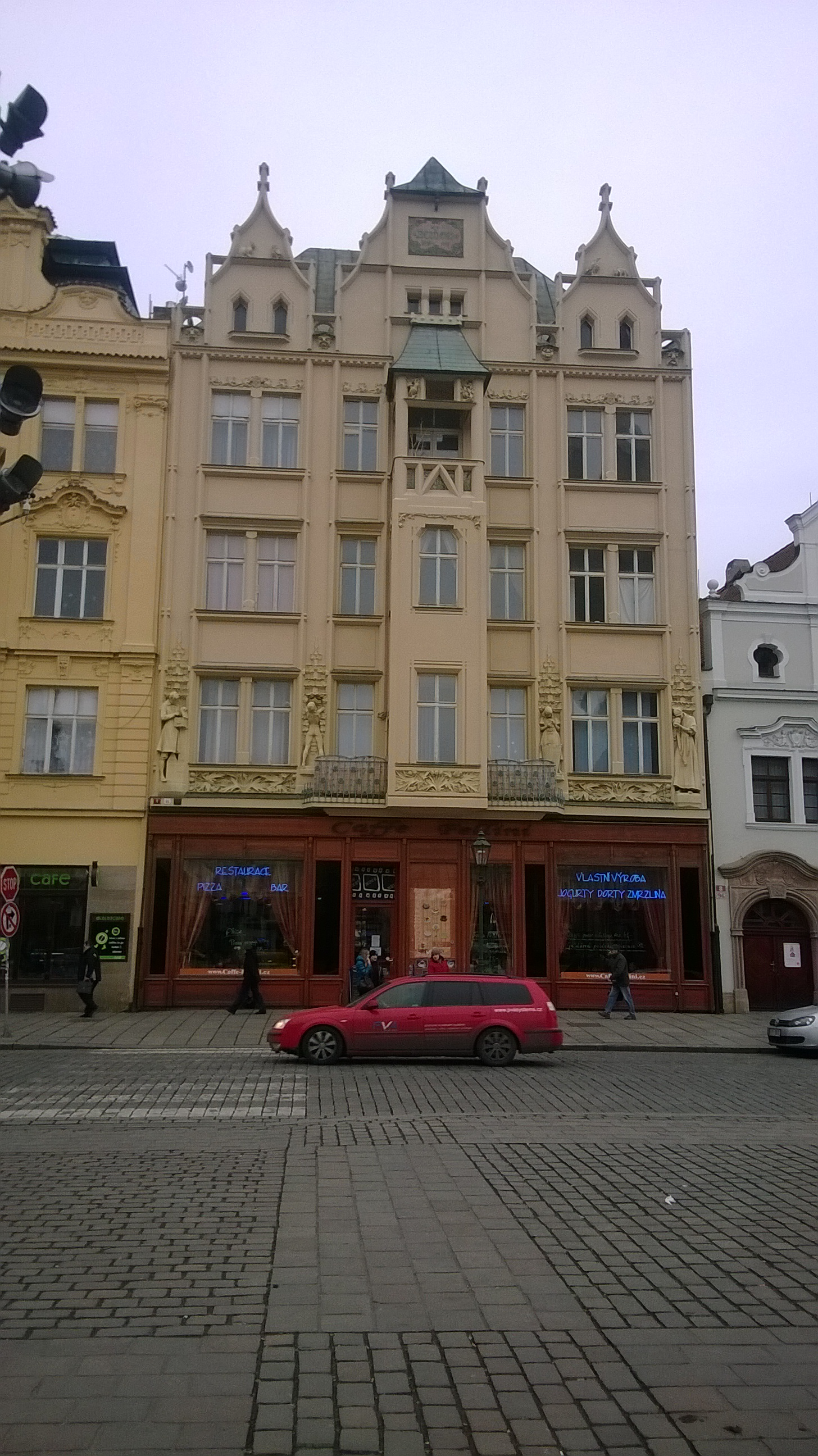 Bezděkovský dům v Plzni